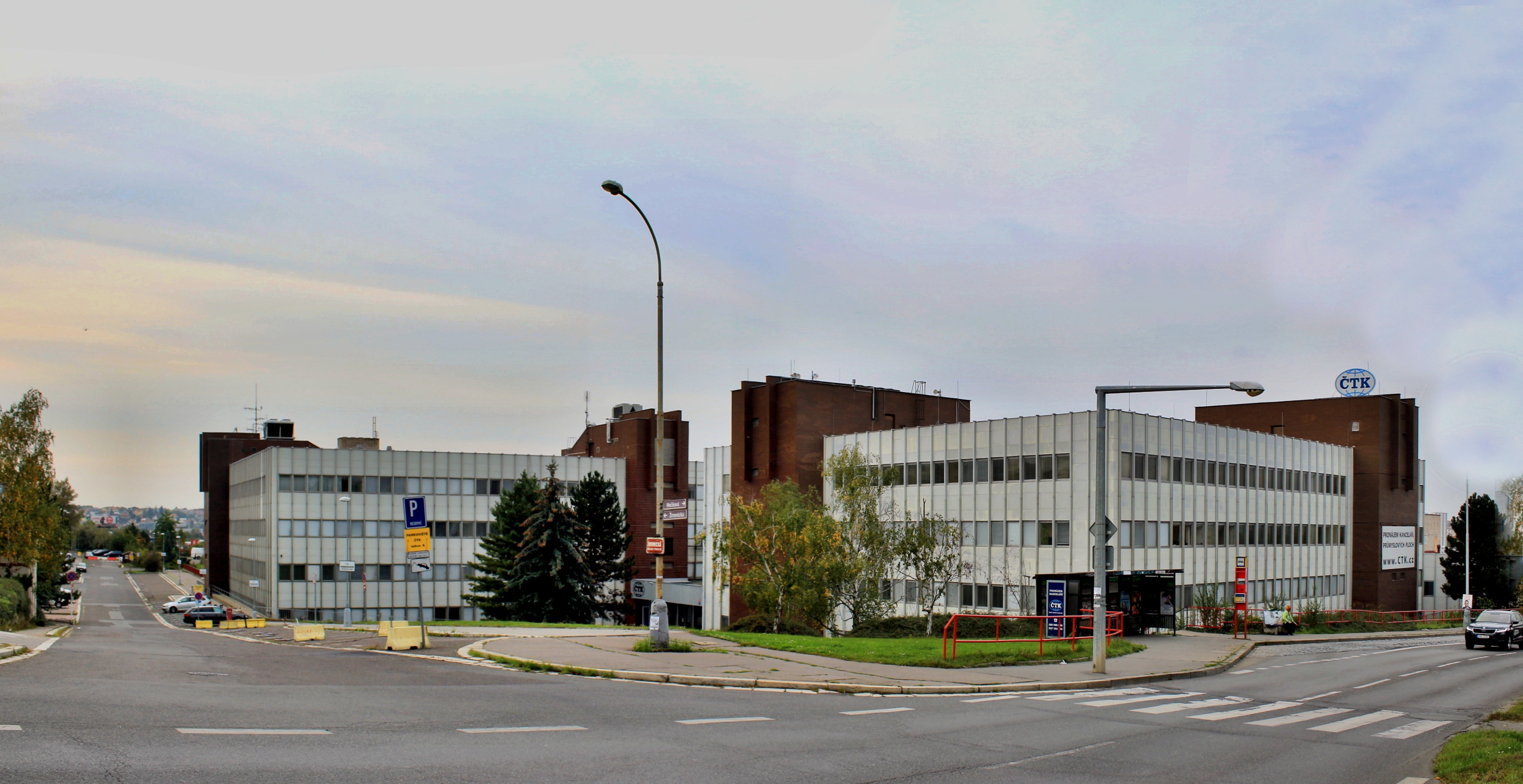 Budova ČTK Praha-Strašnice